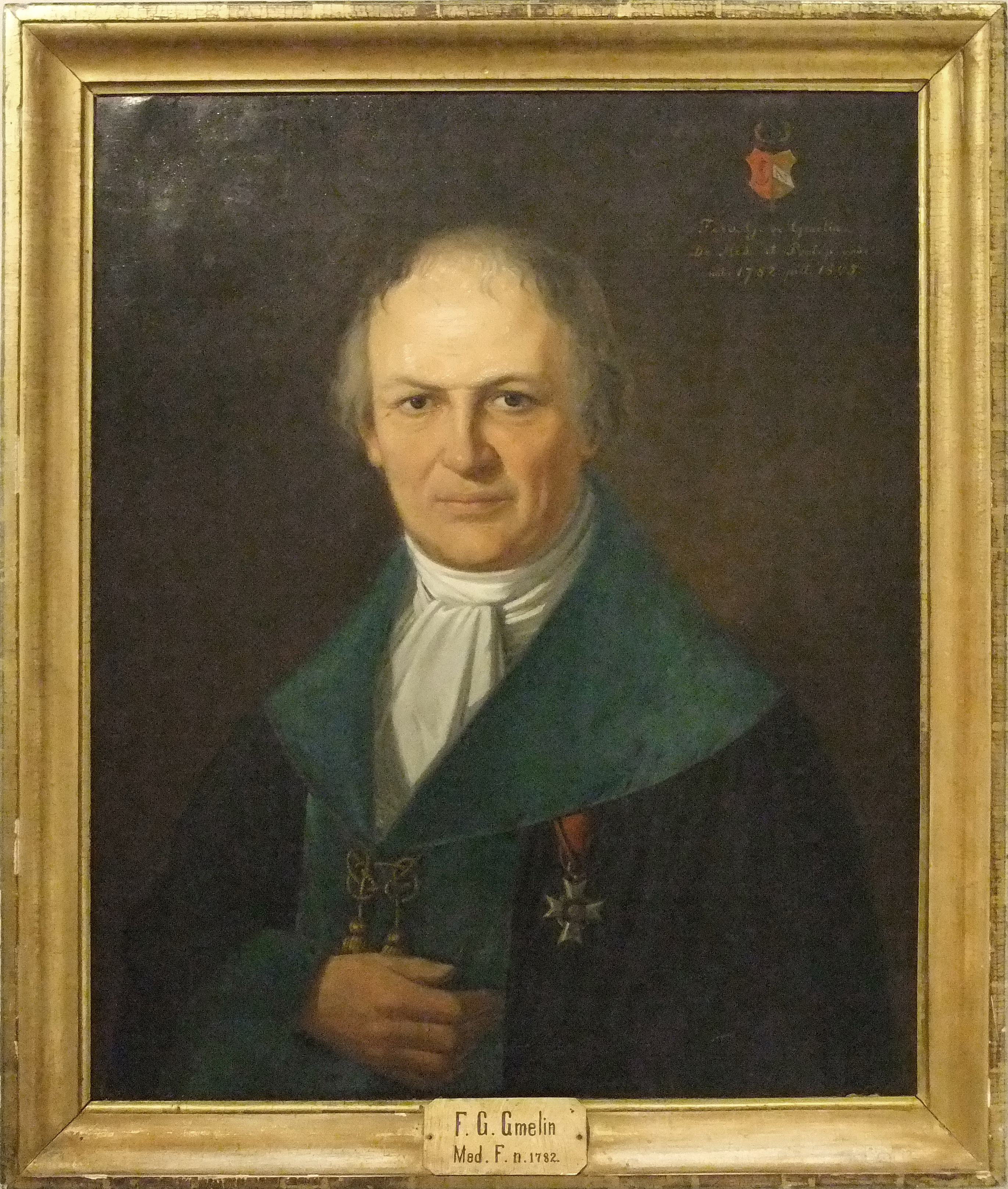 Ferdinand Gottlieb Gmelin (Öl auf Leinwand, 1845) Bildnis aus der Tübinger Professorengalerie